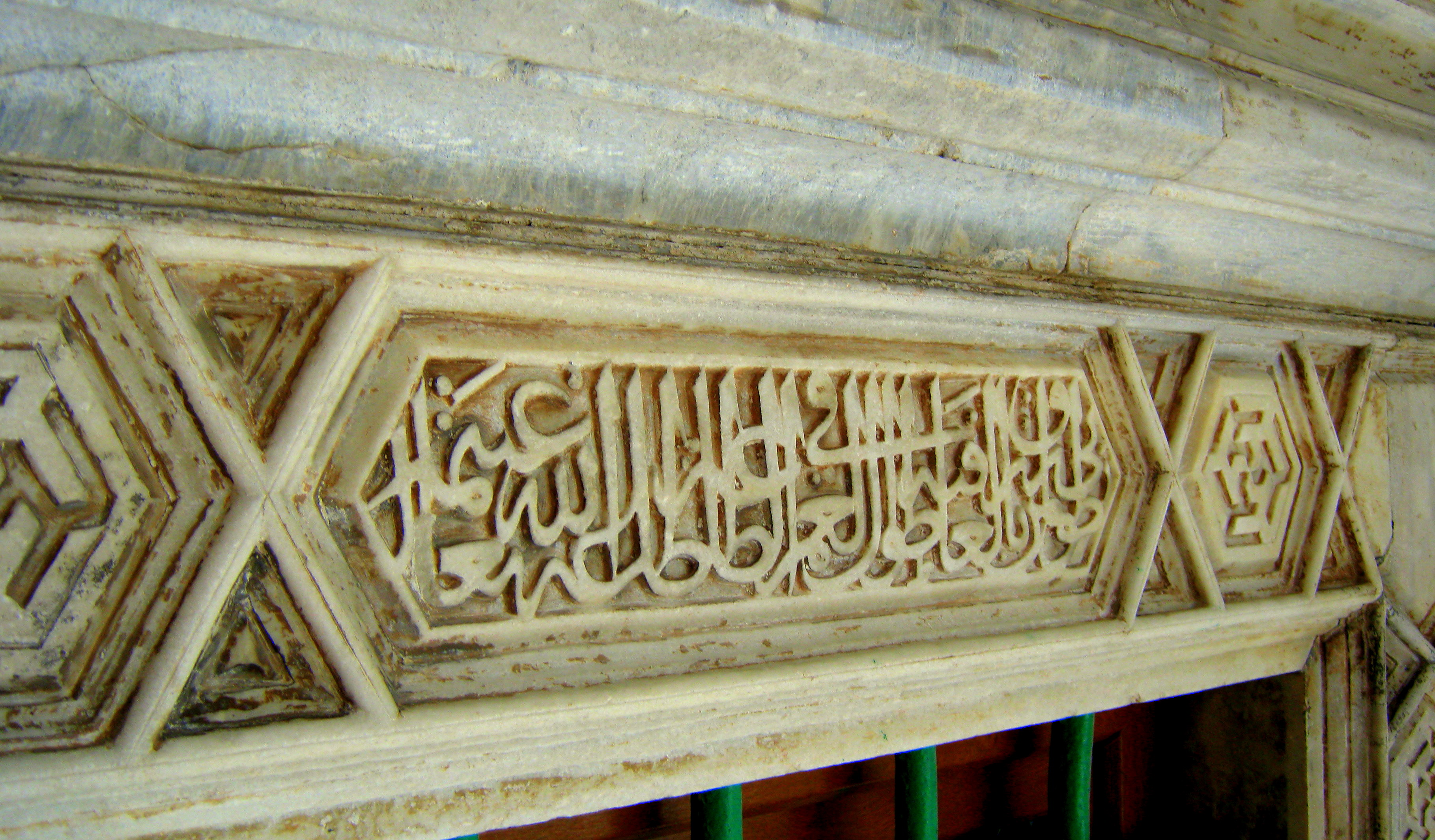 YILDIRIM,BEYAZIT,CAMİİ,BURSA,TAŞ,İŞCİLİĞİ